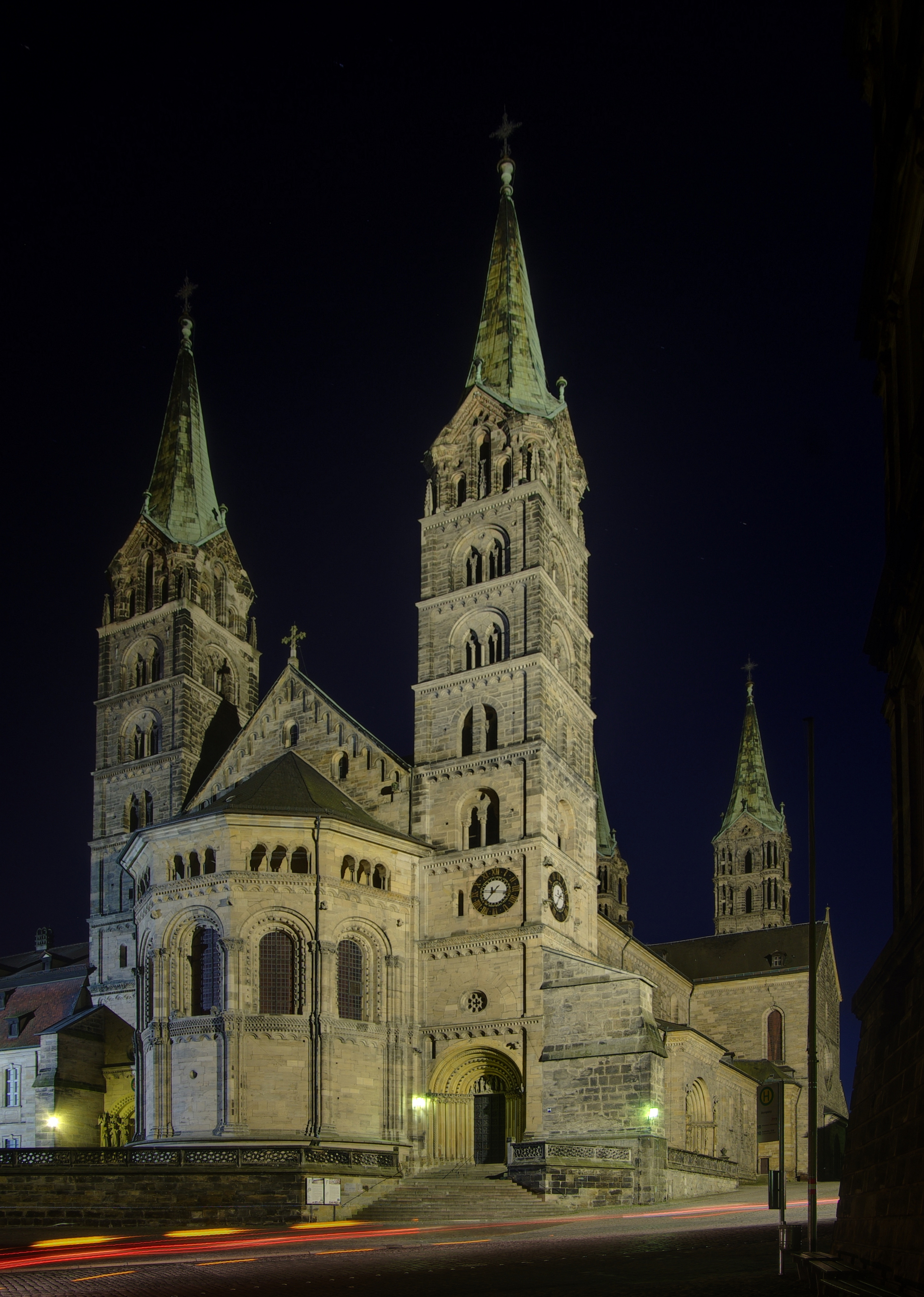 Bamberger Dom bei Nacht